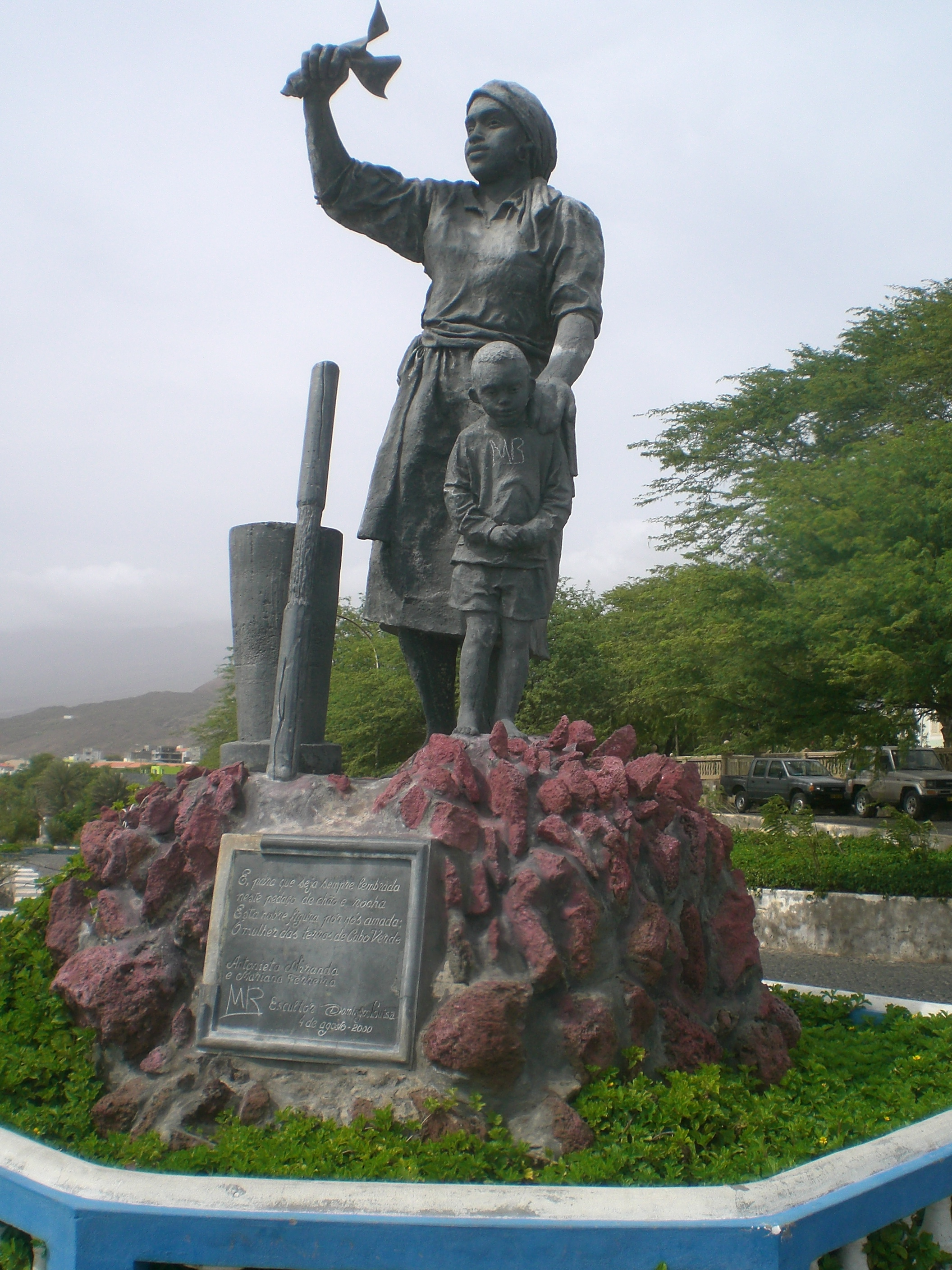 Escultura en la ciudad de Porto Novo